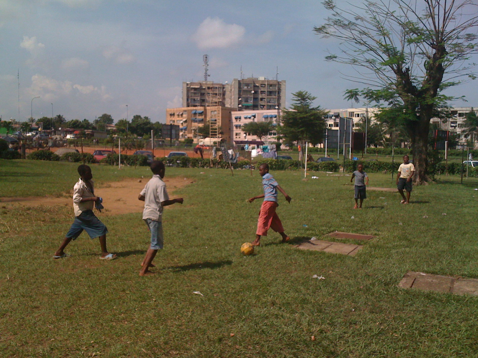 Enfants jouant au football à Cocody les deux plateaux à Abidjan (Côte d'Ivoire)